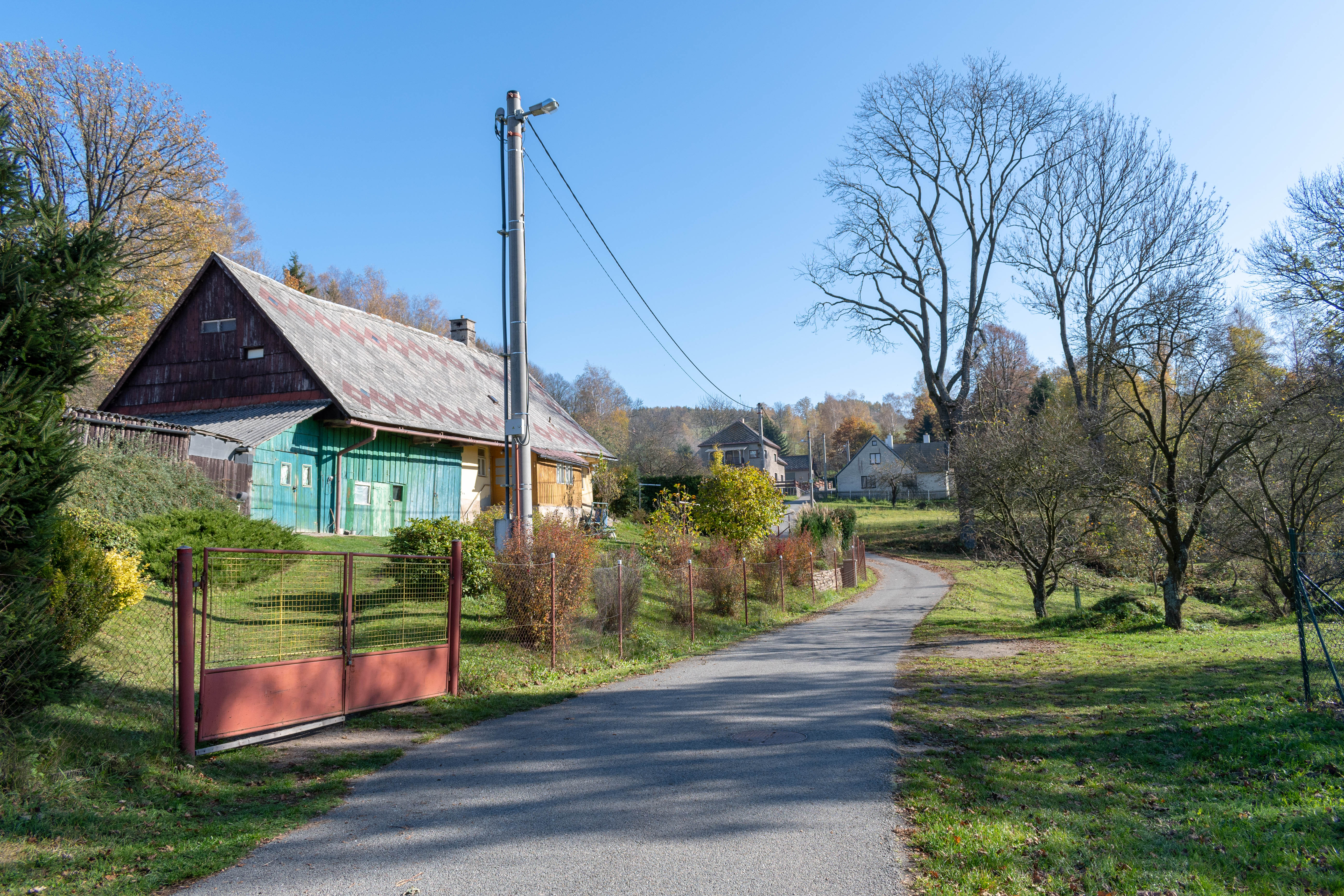 Celkový pohled na obec Stanovník